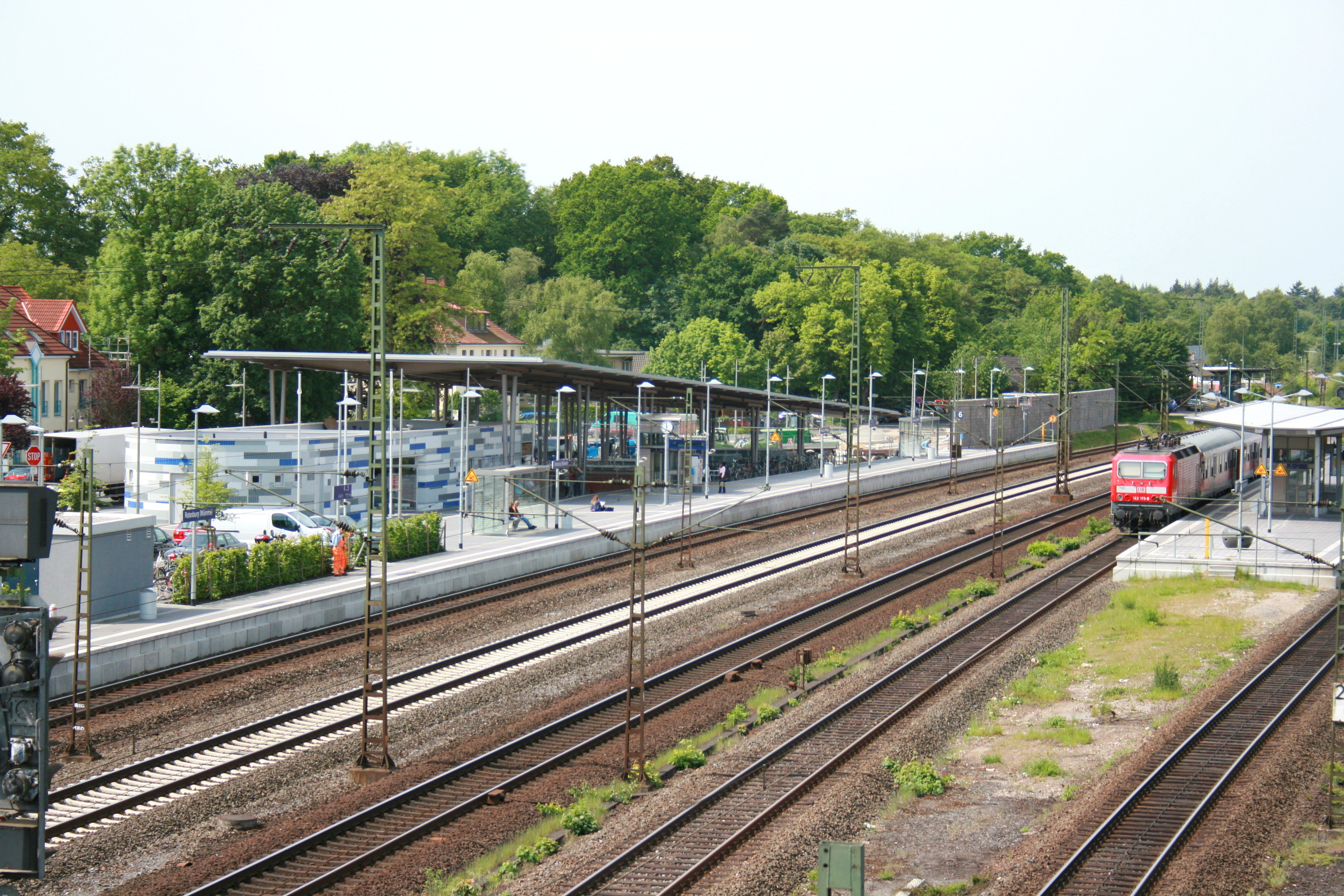 Bahnhof in Rotenburg (Wümme)